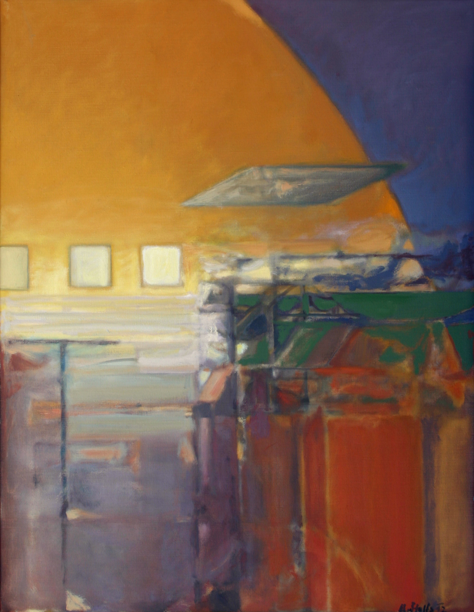 Miroslav Štolfa, Metafyzické zátiší III, olej, plátno, 90 x 70 cm, 2012